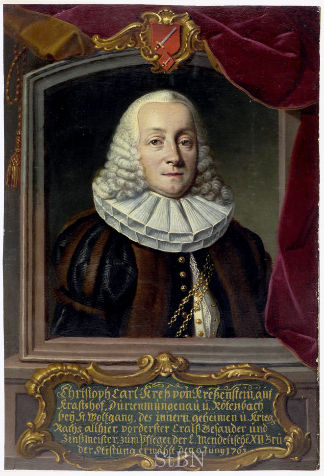 Christoph Carl Kreß von Kreßenstein (Kress von Kressenstein), Pfleger der Mendelschen Zwölfbrüderstiftung Transkription und weitere Informationen